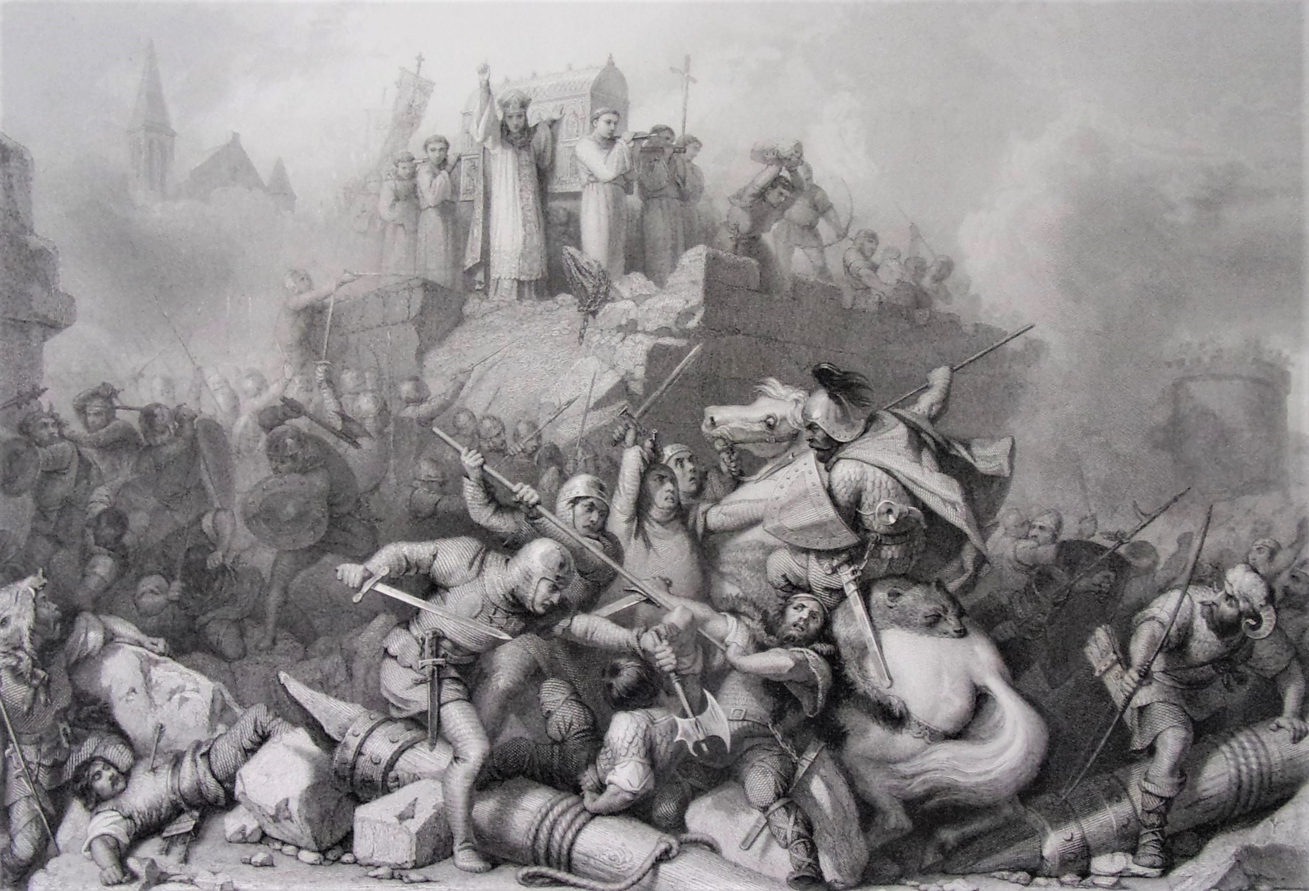 Défaites des Normands sous les murs de Tous en 853